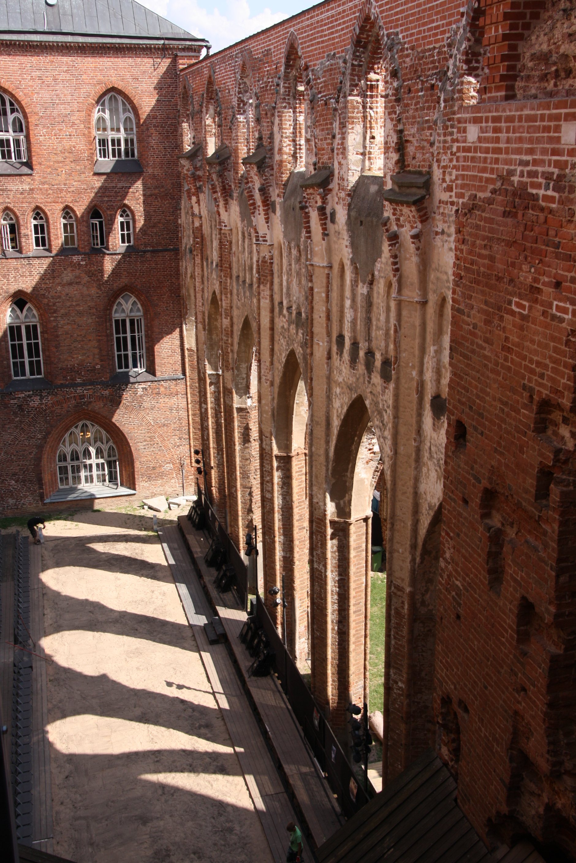 Tartu Toomkirik